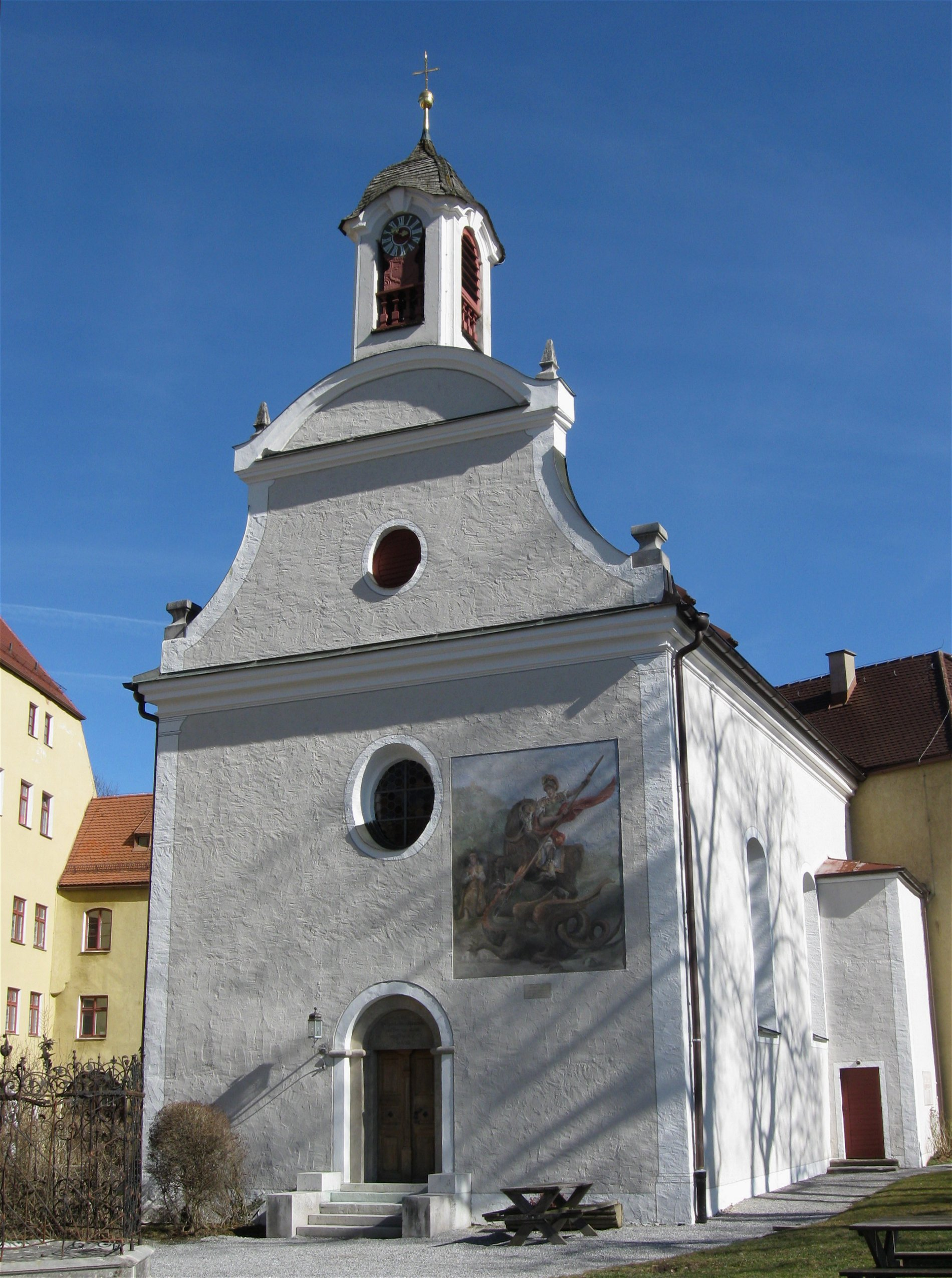 Neubeuern, Schloßkapelle St. Augustin, im Kern romanisch, barocker Ausbau 1751 durch Philipp Millauer